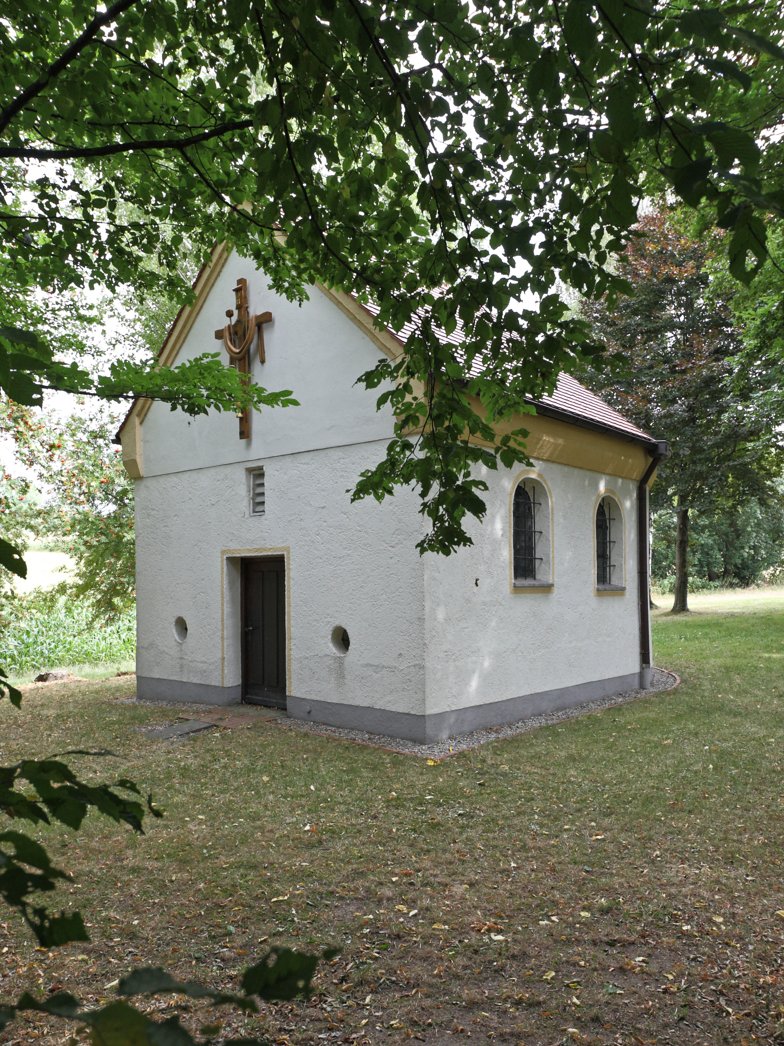 Südwestansicht